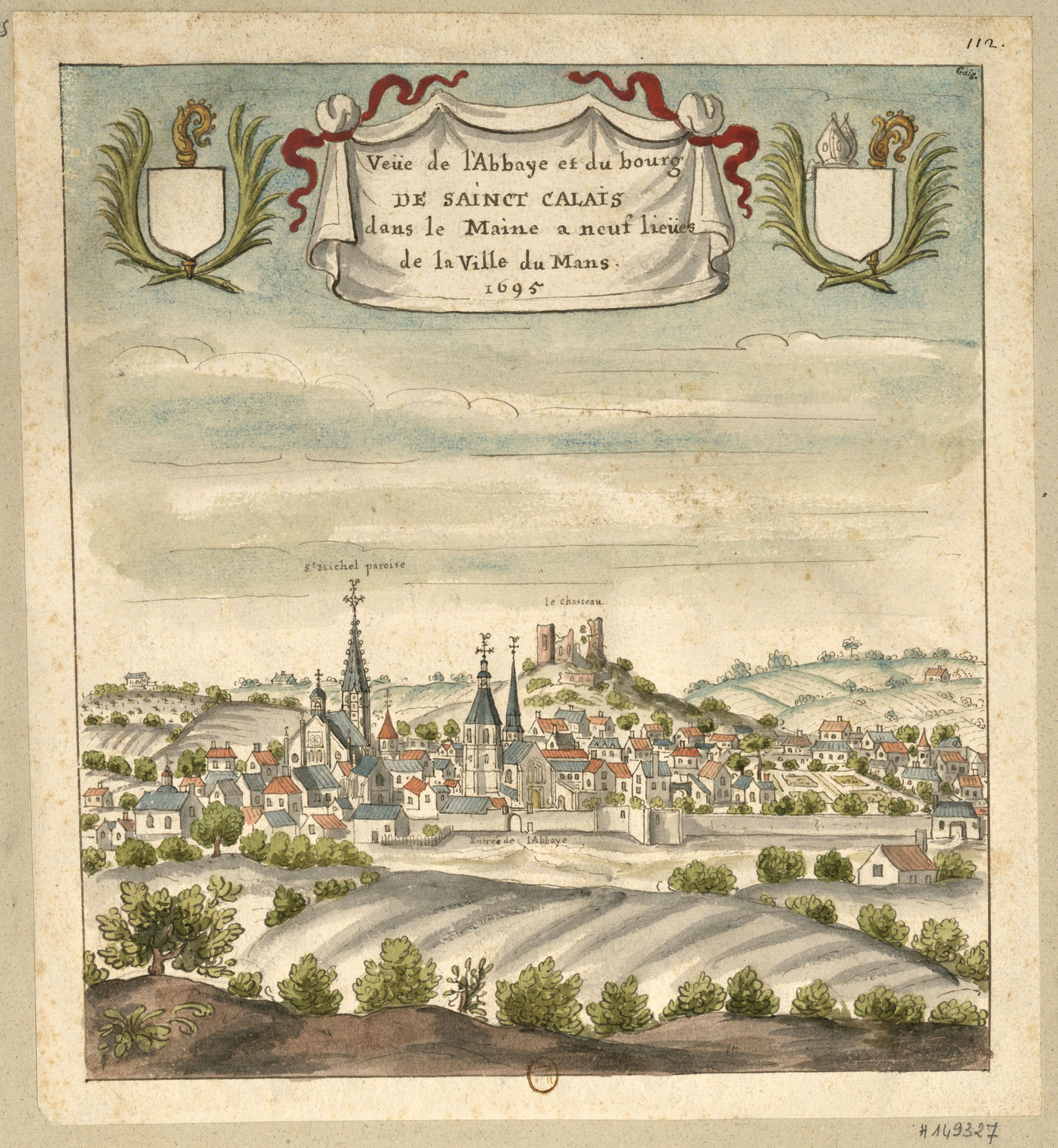 Gravure de la ville de St Calais (Sarthe) de 1695.